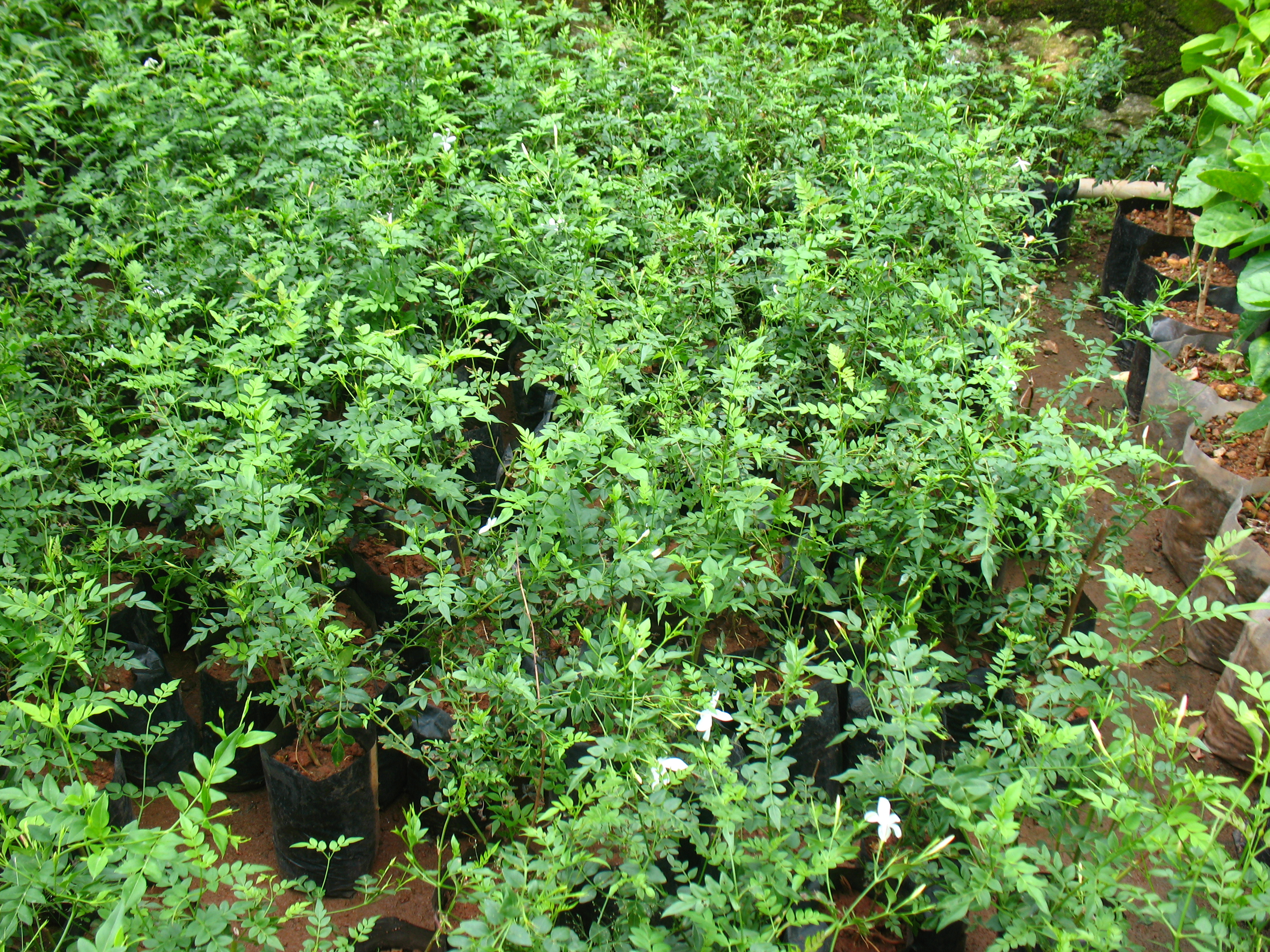 പിച്ചിയുടെ തൈകൾ കൂടകളിൽ നട്ടിട്ടുള്ളത്.